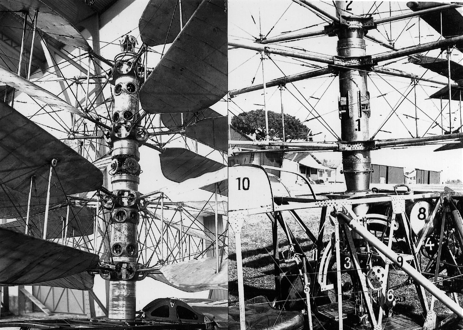 Le premier mât du rotor coaxial présenté (à gauche) est celui de l'hélicoptère Pescara 2R. Il comprend des pièces en fonderie d'aluminium. Le deuxième mât du rotor coaxial (à droite) est celui du 4S, qui comprend des pièces chaudronnées.